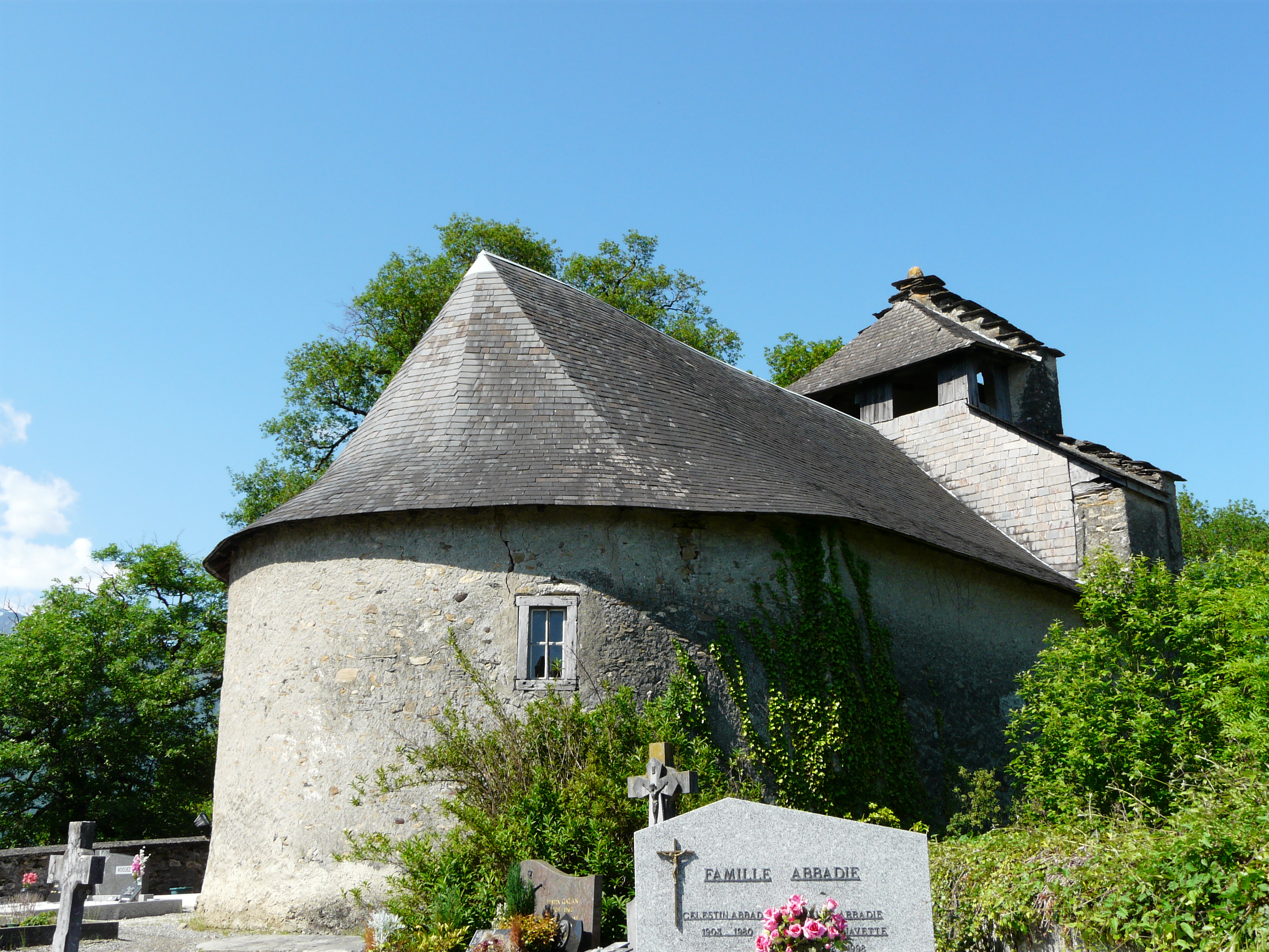 L'église Saint-Vincent de Silhen vue du nord-est, Boô-Silhen, Hautes-Pyrénées, France.